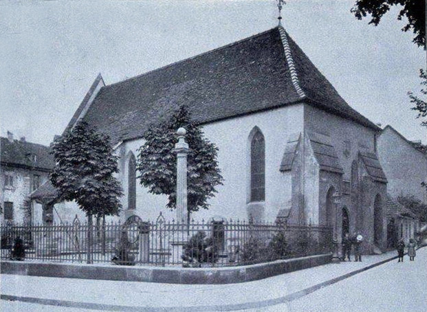 Mulhouse. St. Johannes Kapelle = Chapelle St. Jean. Bibliothèque nationale et universitaire de Strasbourg